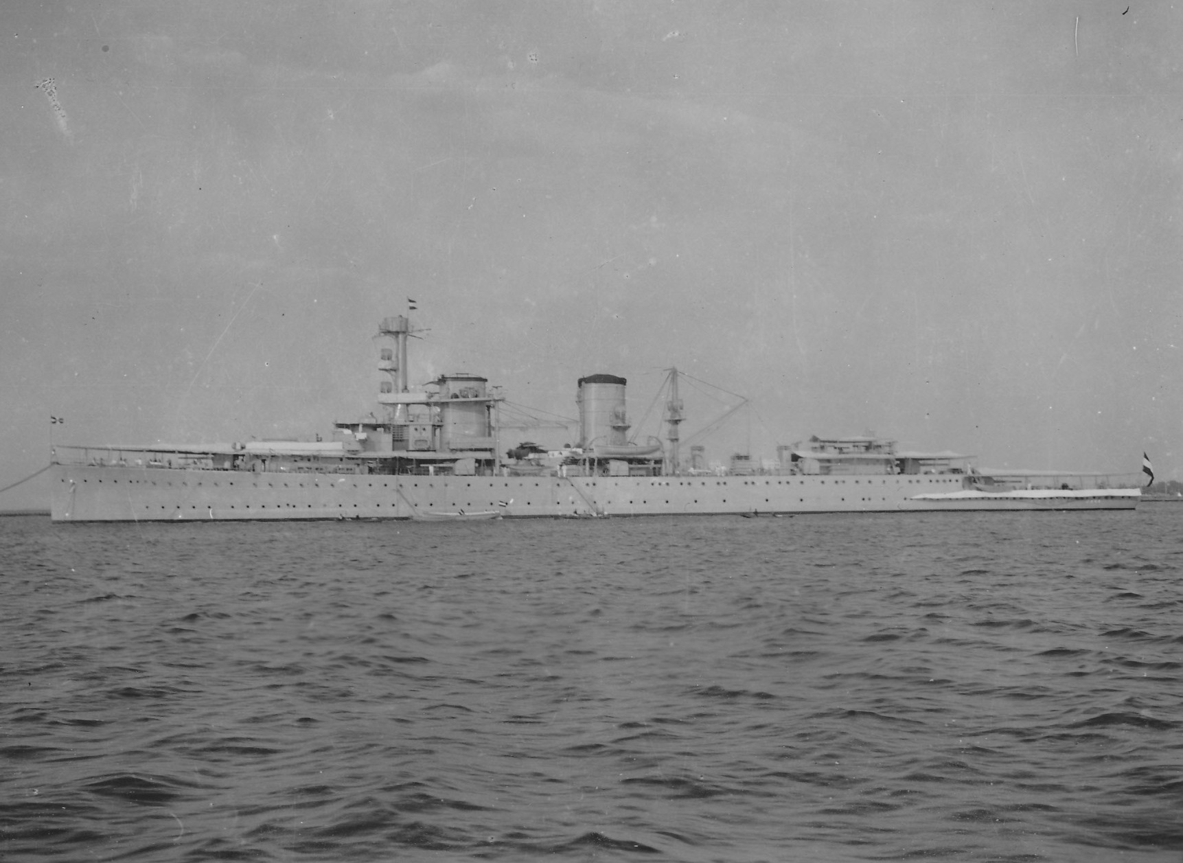 H.M. Java in Nederlands Indië ca. 1935